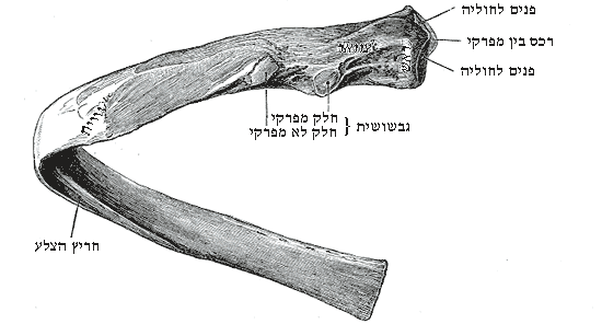 צלע אופיינית שמאלית במבט אחורי